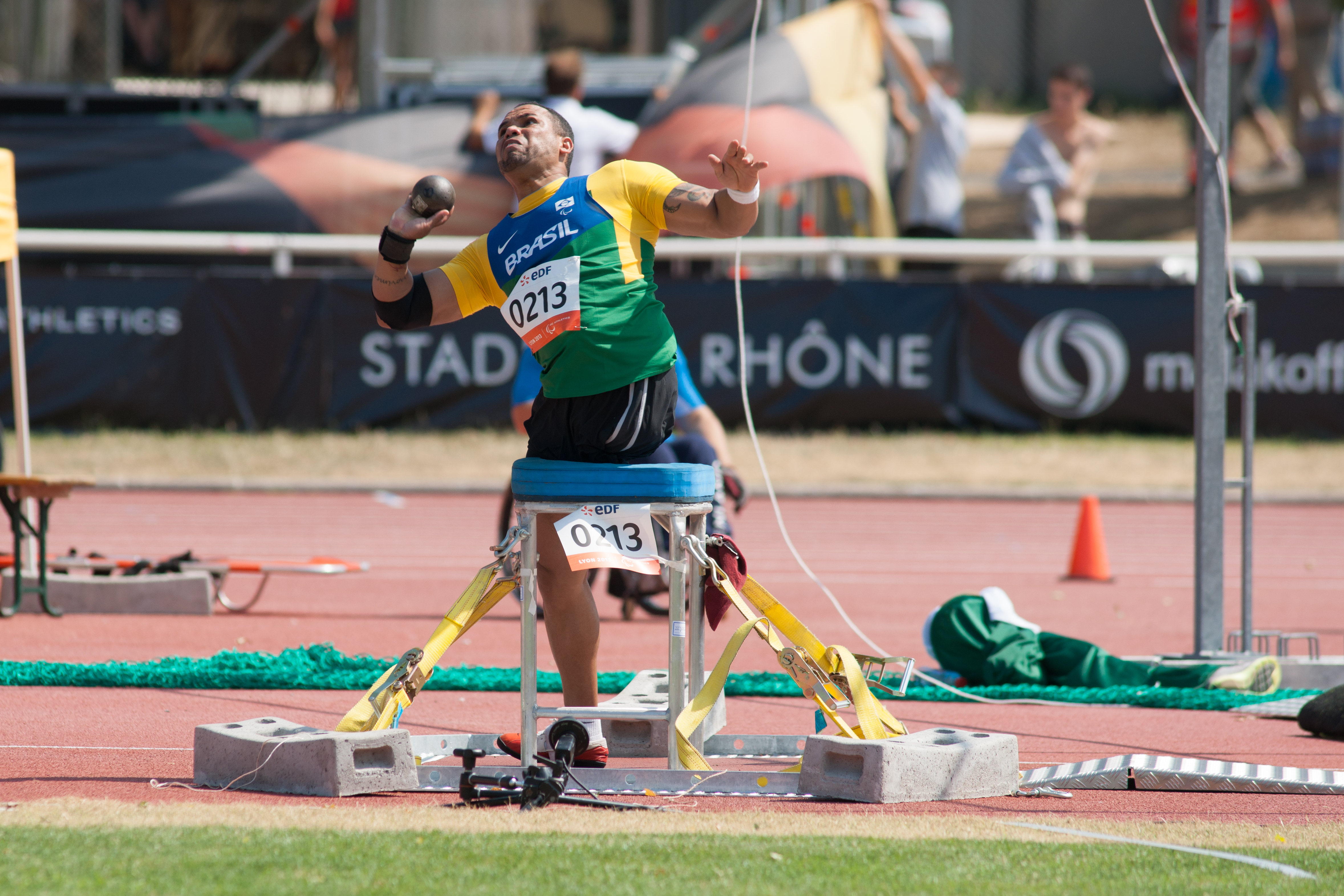 Championnats du monde d'athlétisme handisport 2013.